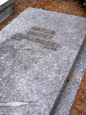 Artur Nacht Samborski's monument (Powązki Cemetery; Cmentarz Komunalny, d. Wojskowy)